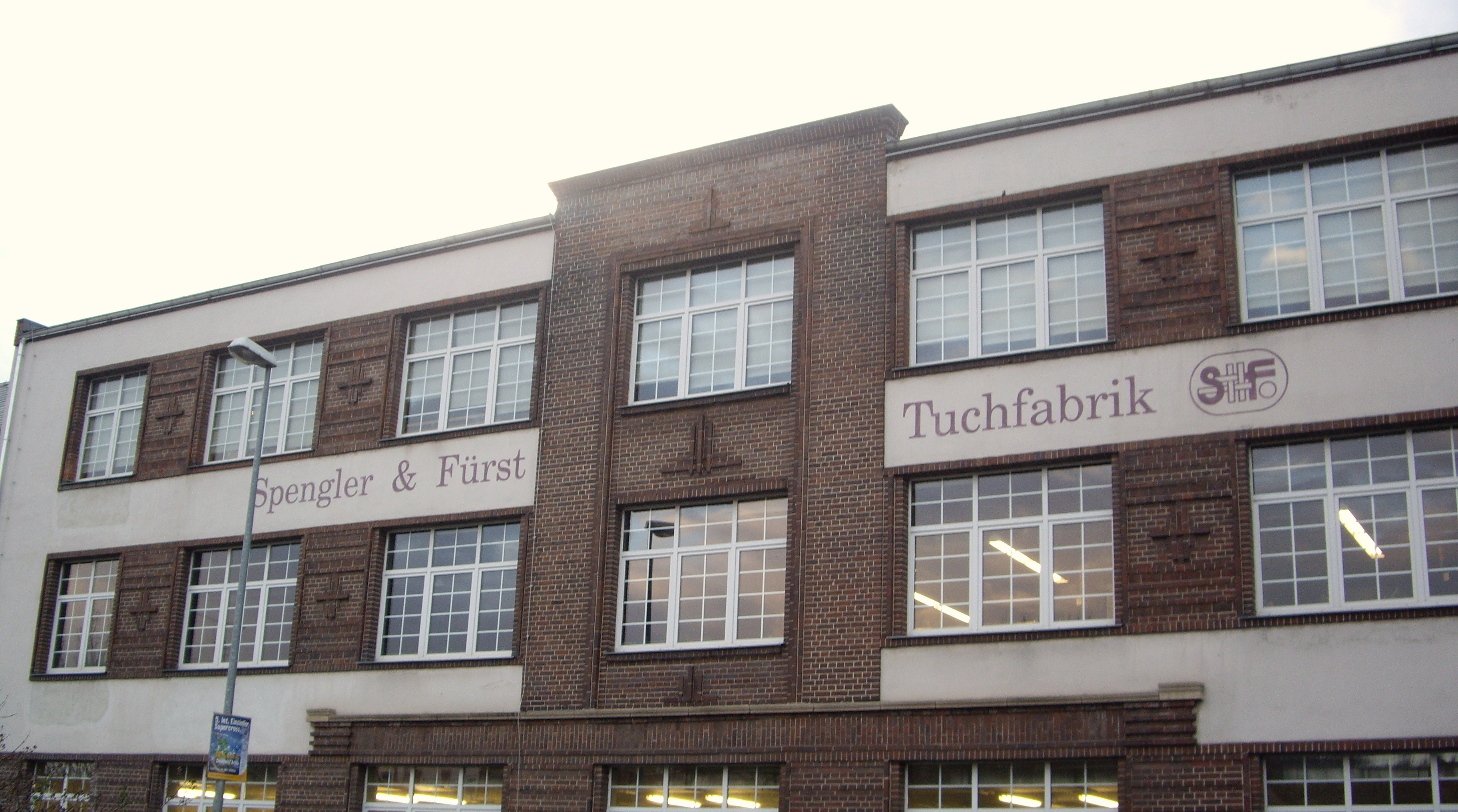 Fabrikgebäude der Tuchfabrik Spengler & Fürst GmbH & Co. KG in Crimmitschau, Sachsen